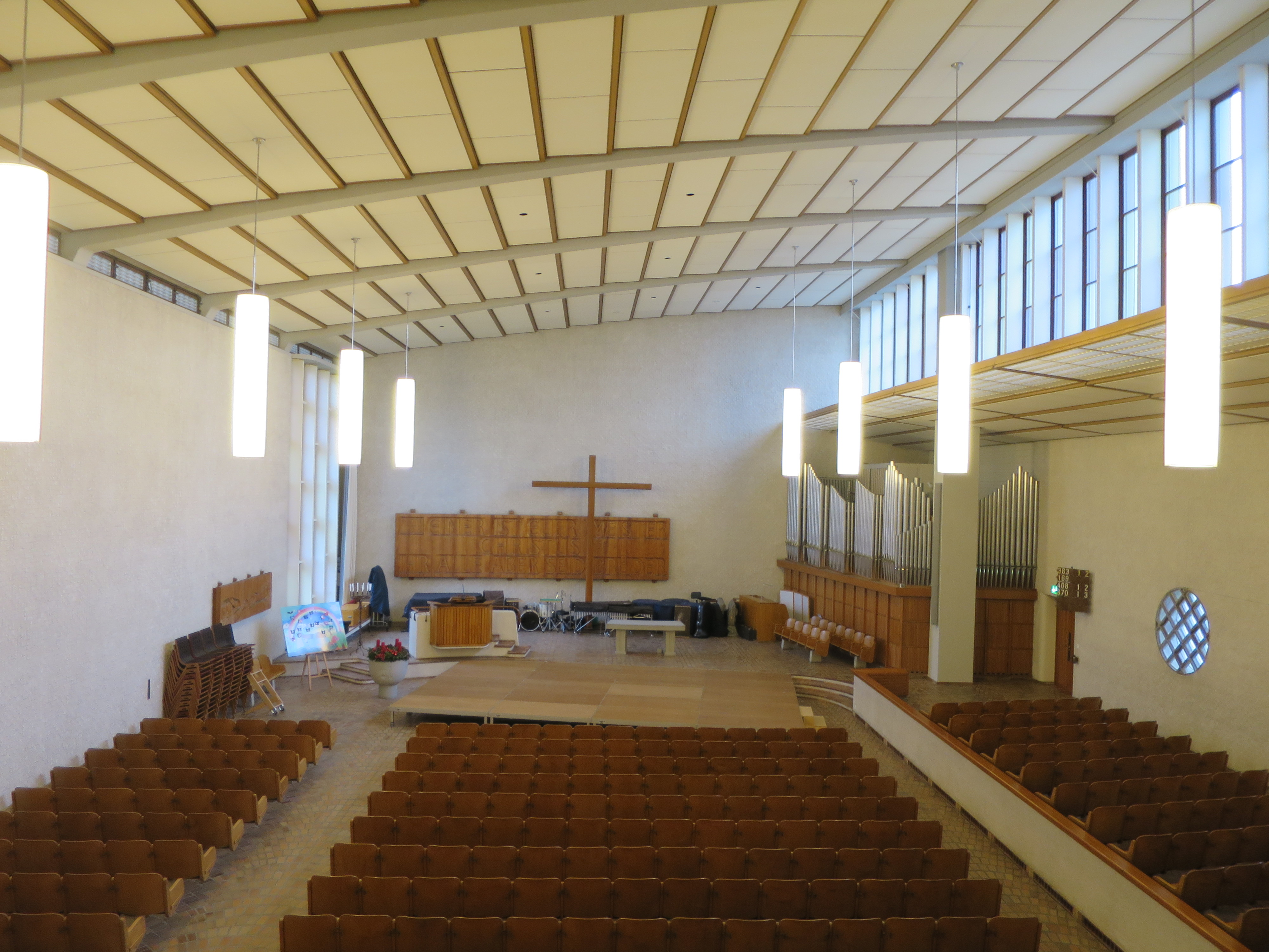 Neue Kirche Altstetten